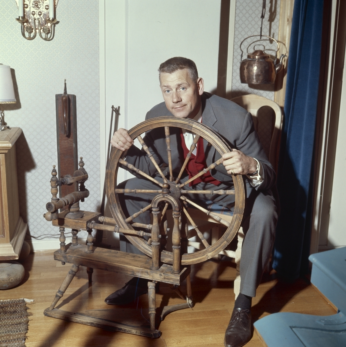 Arve Opsahl (1921-2007) var en norsk skuespiller, sanger og komiker.